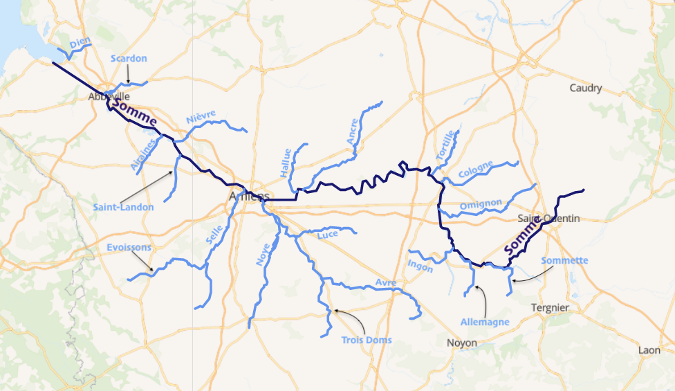 carte réalisée sur umap This map may be incomplete, and may contain errors. Don't rely solely on it for navigation.